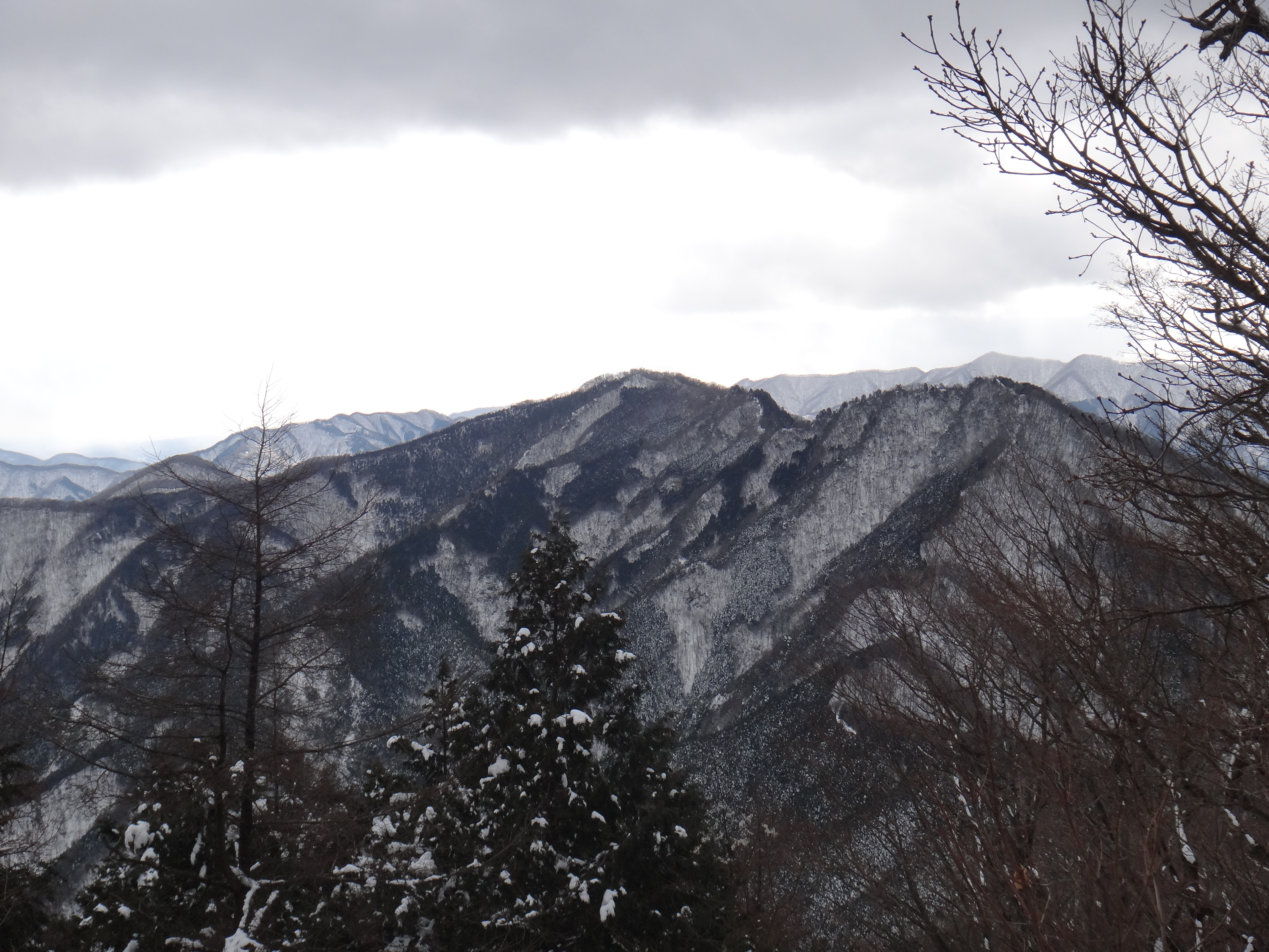 武甲山から見た大持山と小持山